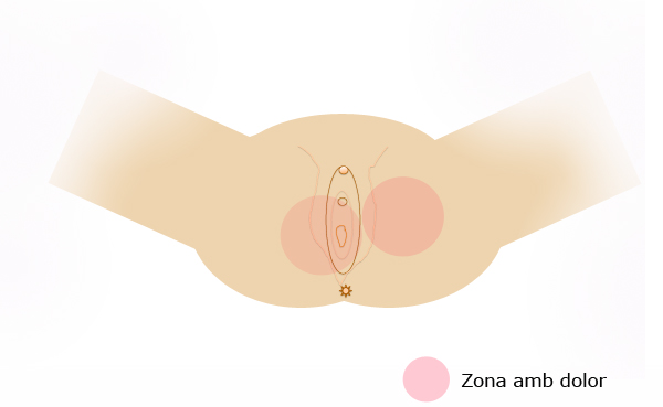 Zones de dolor en la vulvodínia generalitzada